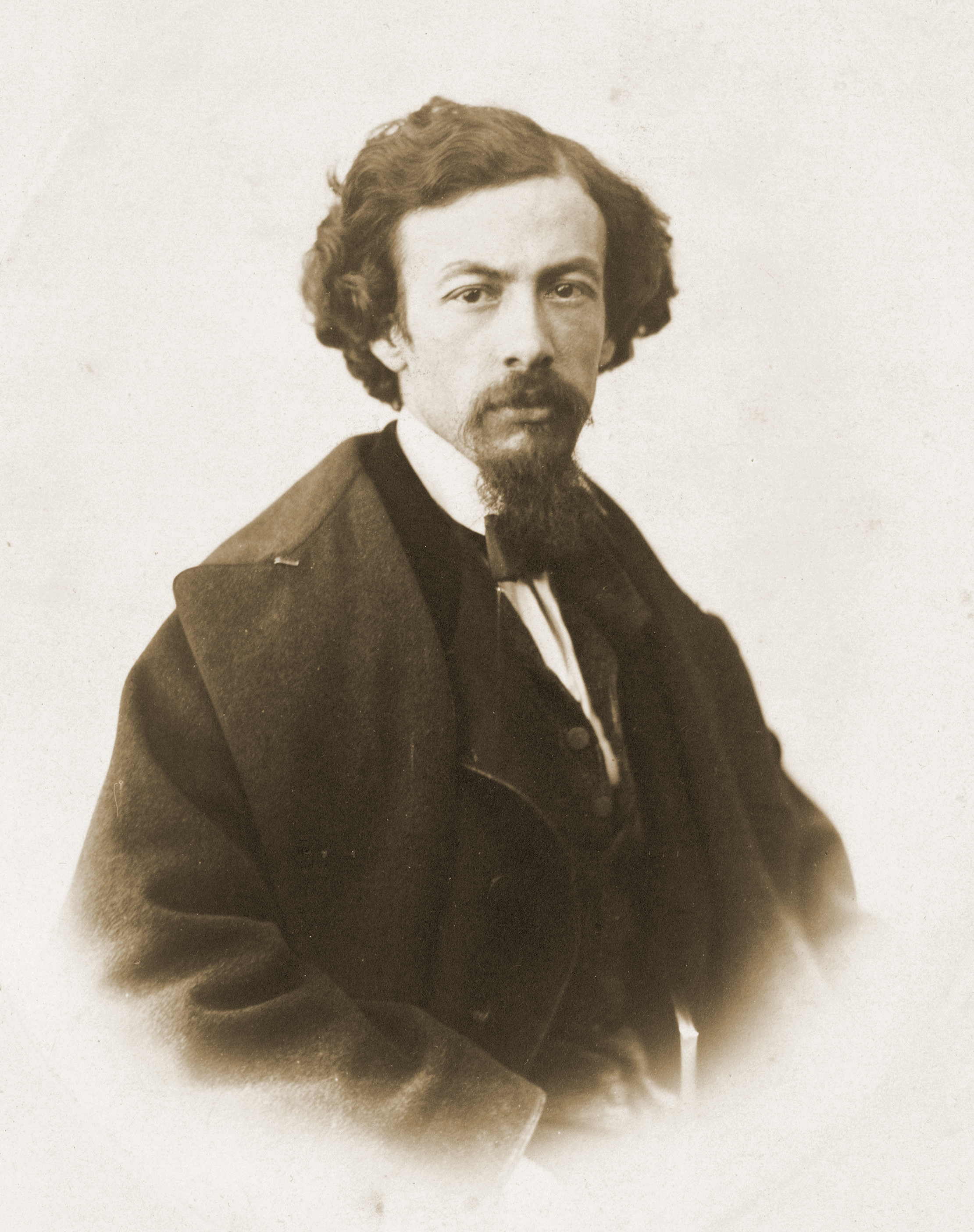 Autoportrait Gustave Le Gray, vers 1856-1859